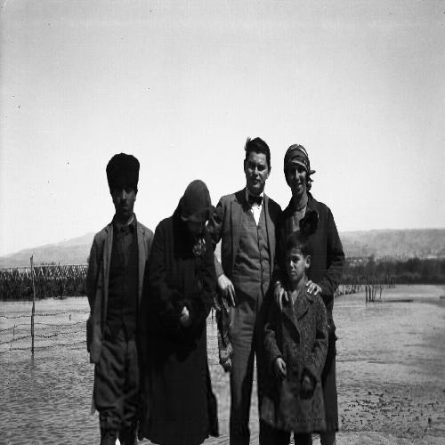 טיול בממלכת ירדן. מימין לשמאל: חנה רופין, רפאל רופין (הילד), דניאל אוסטר ורעייתו ג'וליה, מדריך מקומי, 25.2.27